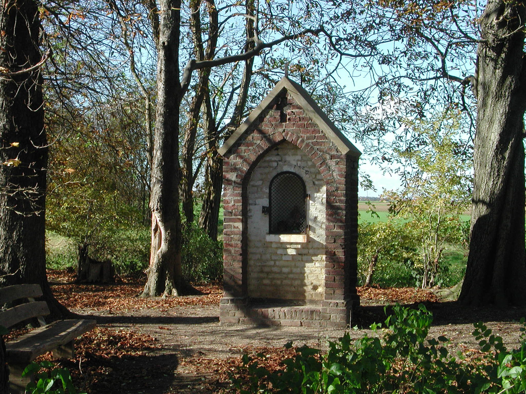 Das Heiligenhaus Ecke Heribertstr./Am Königsforst in Eschweiler über Feld